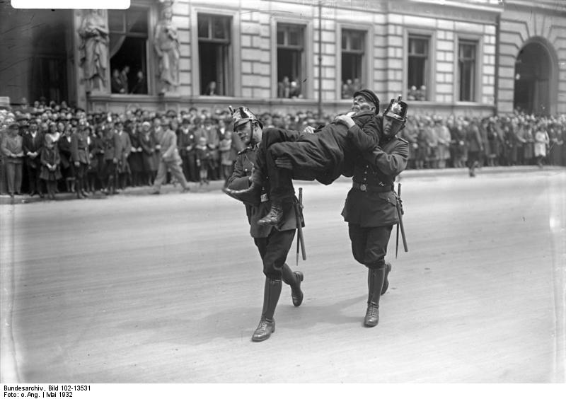 Strassen-Unruhen beim Aufziehen der Skagerrak-Ehrenwache in Berlin ! Ein ohnmächtiger Demonstrant wird von der Polizei fortgeschafft.